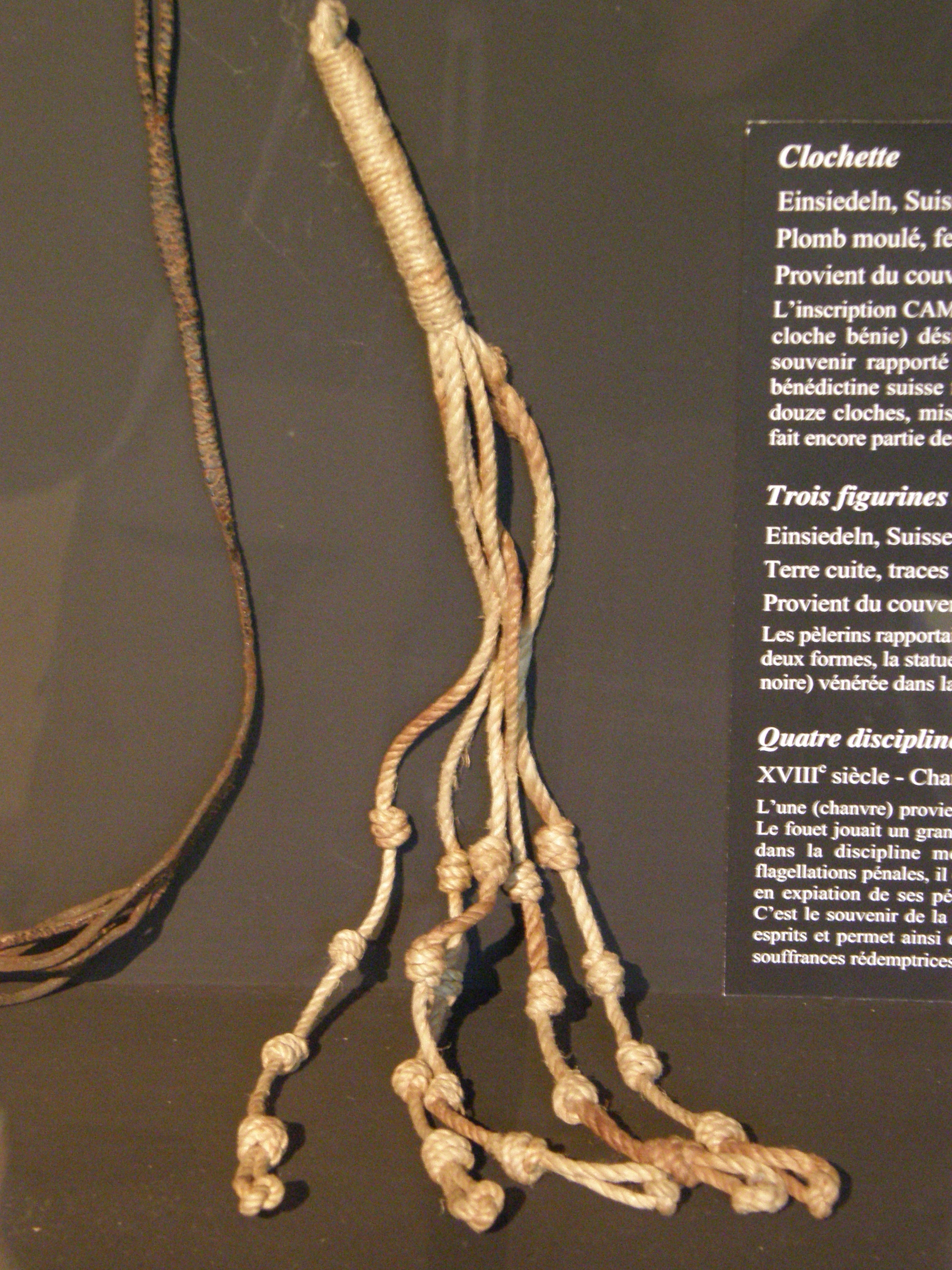 Ustensile servant à se fouetter le dos, pour faire pénitence.